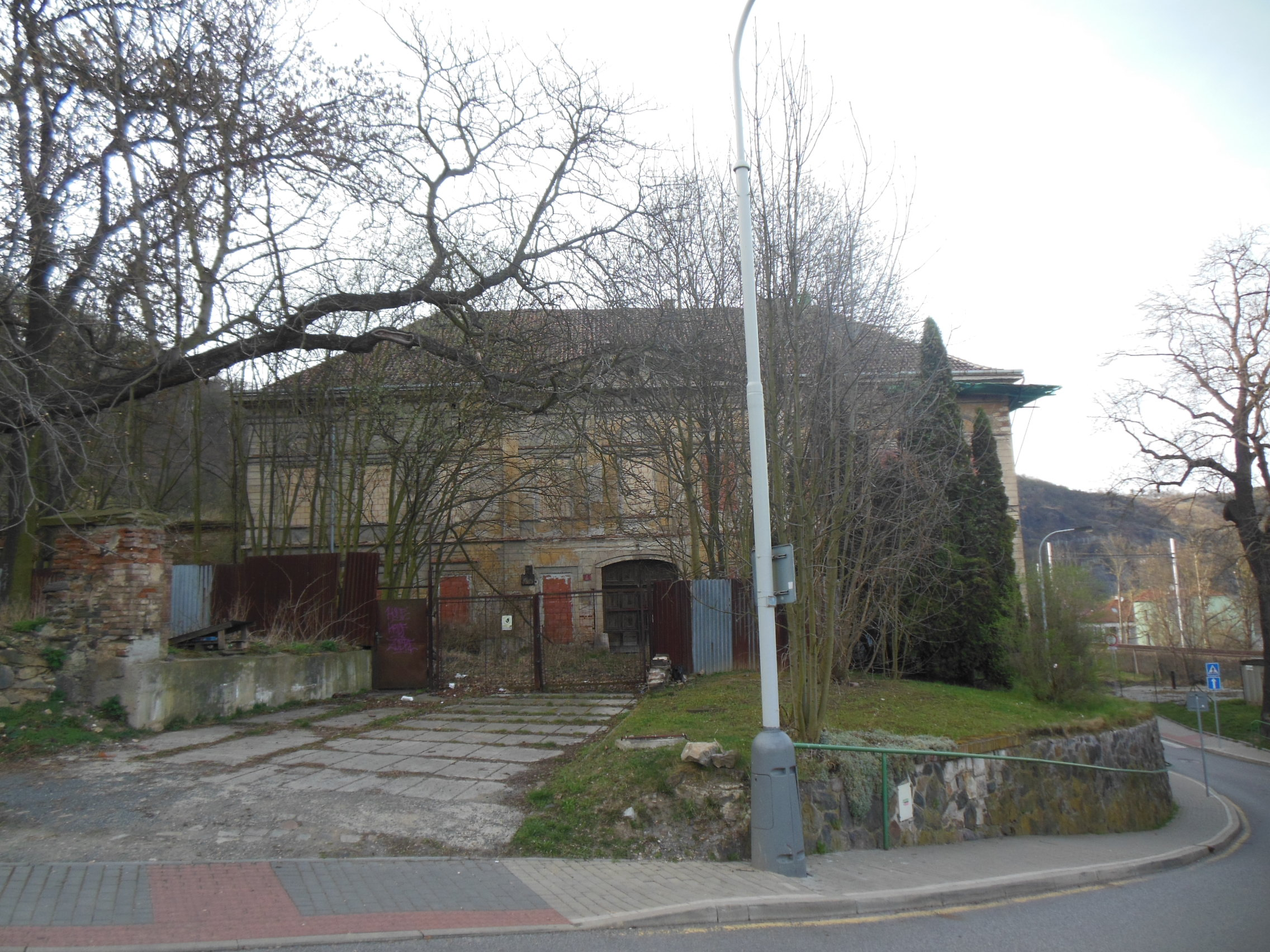 Praha-Sedlec. Zámek č. 7/19 v ulici V Sedlci.